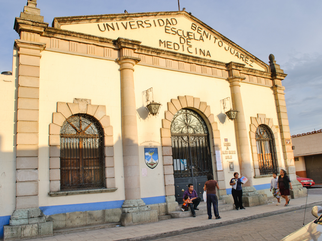 Escuela de Medicina de La Universidad Autónoma Benito Juárez de Oaxaca (UABJO)